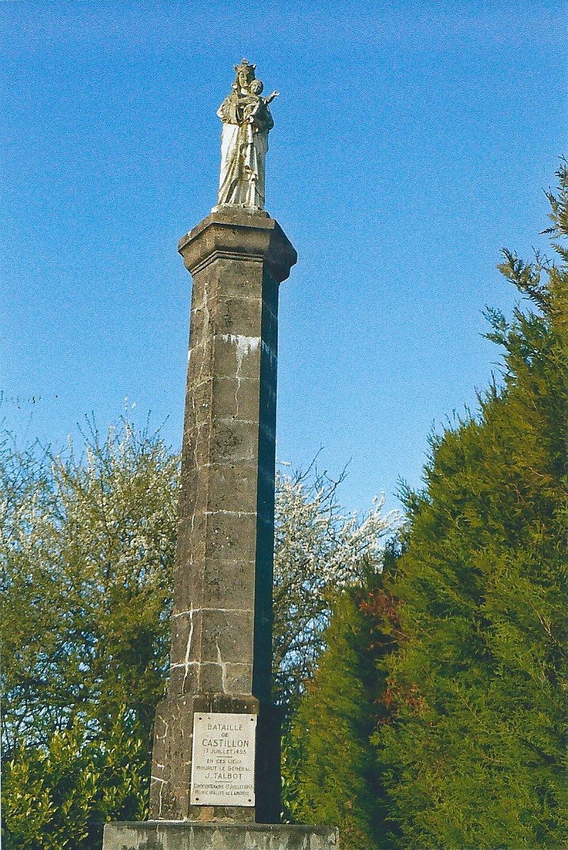 Monument de tabot, se trouvant à l'emplacement de l'ancienne chapelle Notre-Dame de Colles